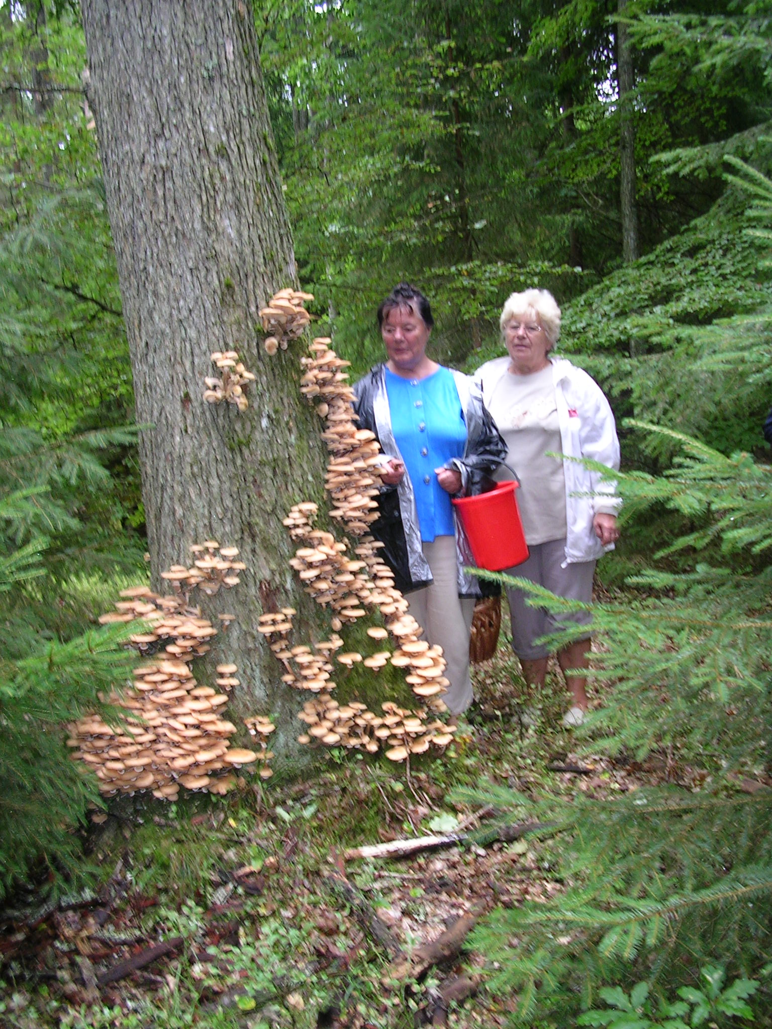 Armillaria